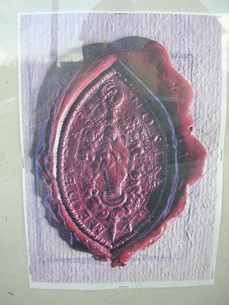 Sceau de cire rouge provenant de l'abbaye cistercienne de moniales de Tart, Côte-d'Or